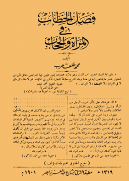 غلاف كتاب : فصل الخطاب فى المراة والحجاب